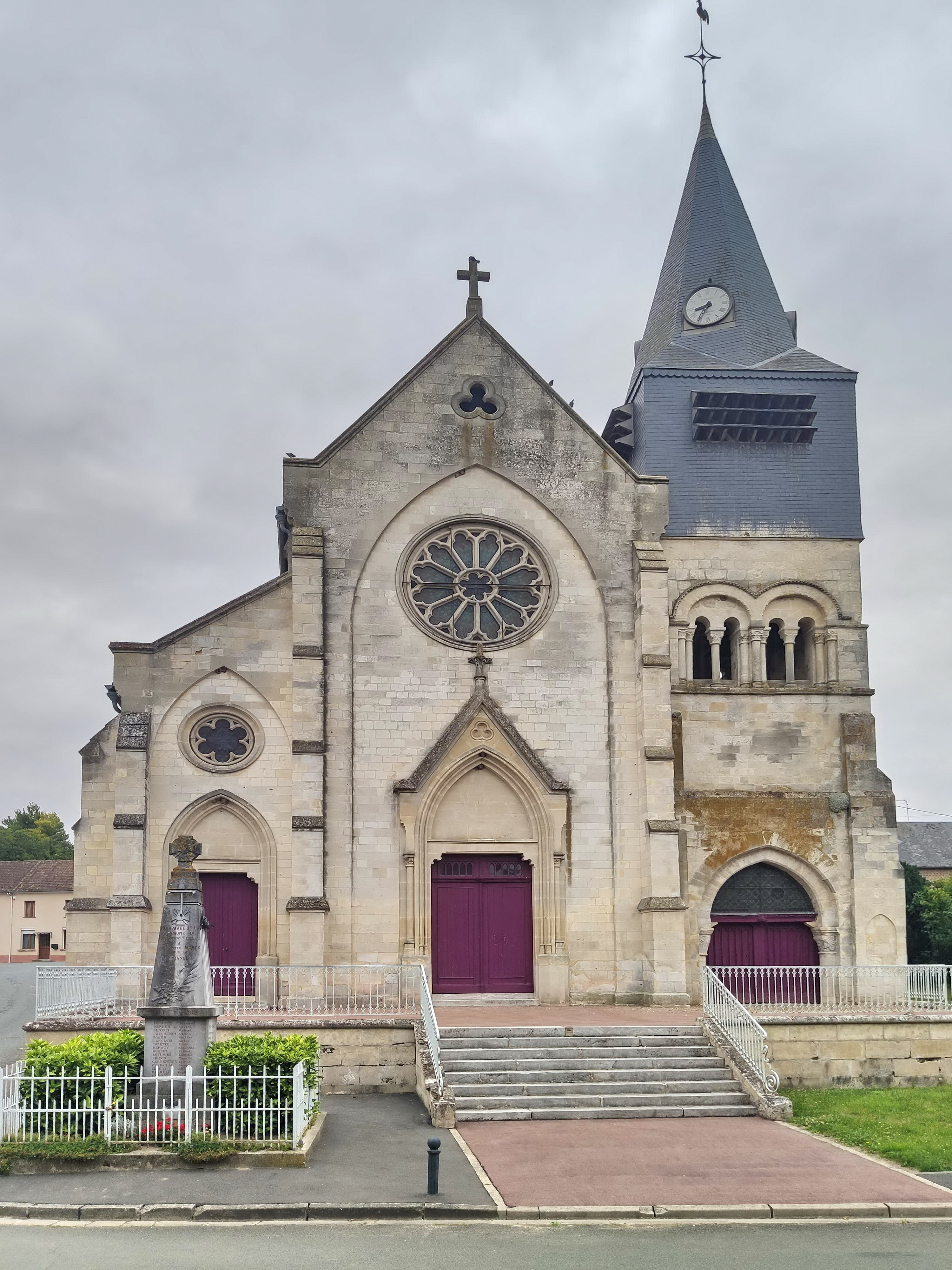 Croissy-sur-Celle - Église Saint-Léger : Façade principale